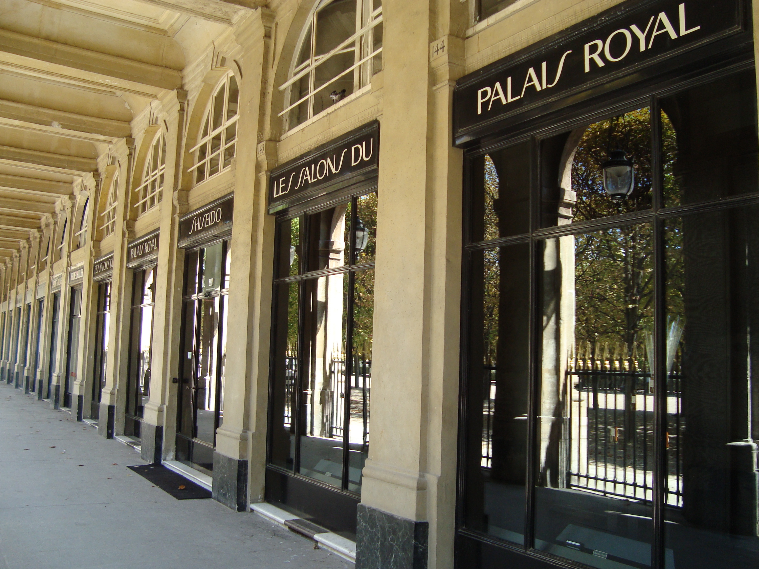 Salons Serge Lutens dans la galerie Valois no 143-144, Palais-Royal, Ier arrondissement, à Paris, France.